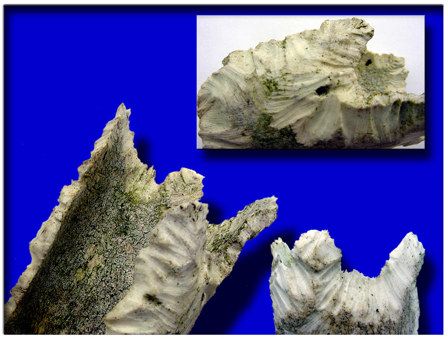 Os de mammifère depuis longtemps abandonné dans la nature, et marqué par les traces de dents d'écureuils. Ce comportement (ronger les os) pourrait avoir une double explication, l'animal cherchant une source de calcium, et cherchant à aiguiser ses incisives. Les bois de cervidés sont également rongés de cette manière (risque de maladie à prion/CWD en Amérique du nord ?) Photo prise dans le parc du Hoge Veluwe au centre des Pays-Bas (Europe). Un problème est que 80 % du plomb toxique bioaccumulé par les mammifères et les oiseaux est fixé dans les os. D'autres polluants (radionucléides) peuvent s'y fixer.